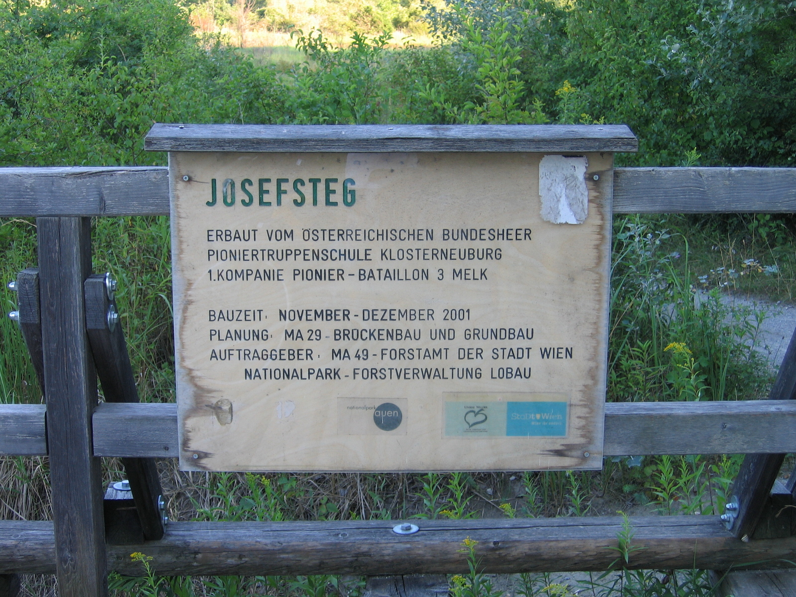 Josephsteg